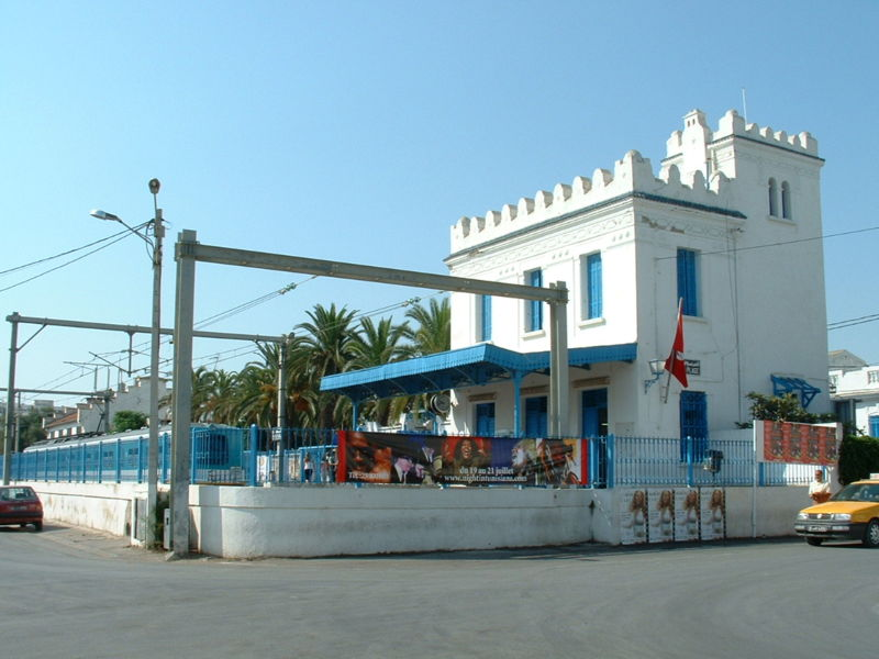 Photographie personnelle de la gare terminus de La Marsa (Tunisie)